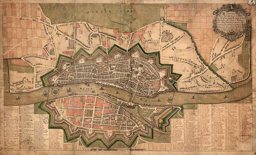 Grundriss Der Keisserlichen-Freyen Reichs- Und Ansee Stadt Bremen, Mit Ihren Vorstaettten, der Führnehmsten Gebäuden Nach Den Alphabeth. 1 Karte: Zeichnung, 100 x 60 cm. - Mit Gebäude- und Straßenverzeichnis. - Ohne Kartennetz